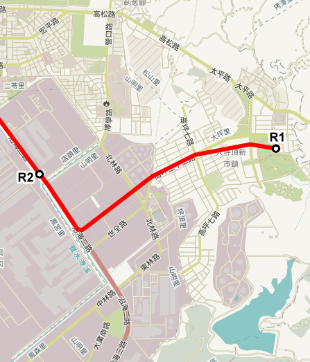 高雄捷運紅線原規劃的R2、R1站